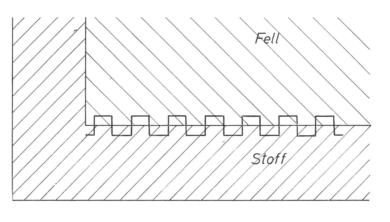 Nähte in der Kürschnerei: Absatz „Nähtechnik, Ledernähte, Haarnähte, Verzugsnaht“.